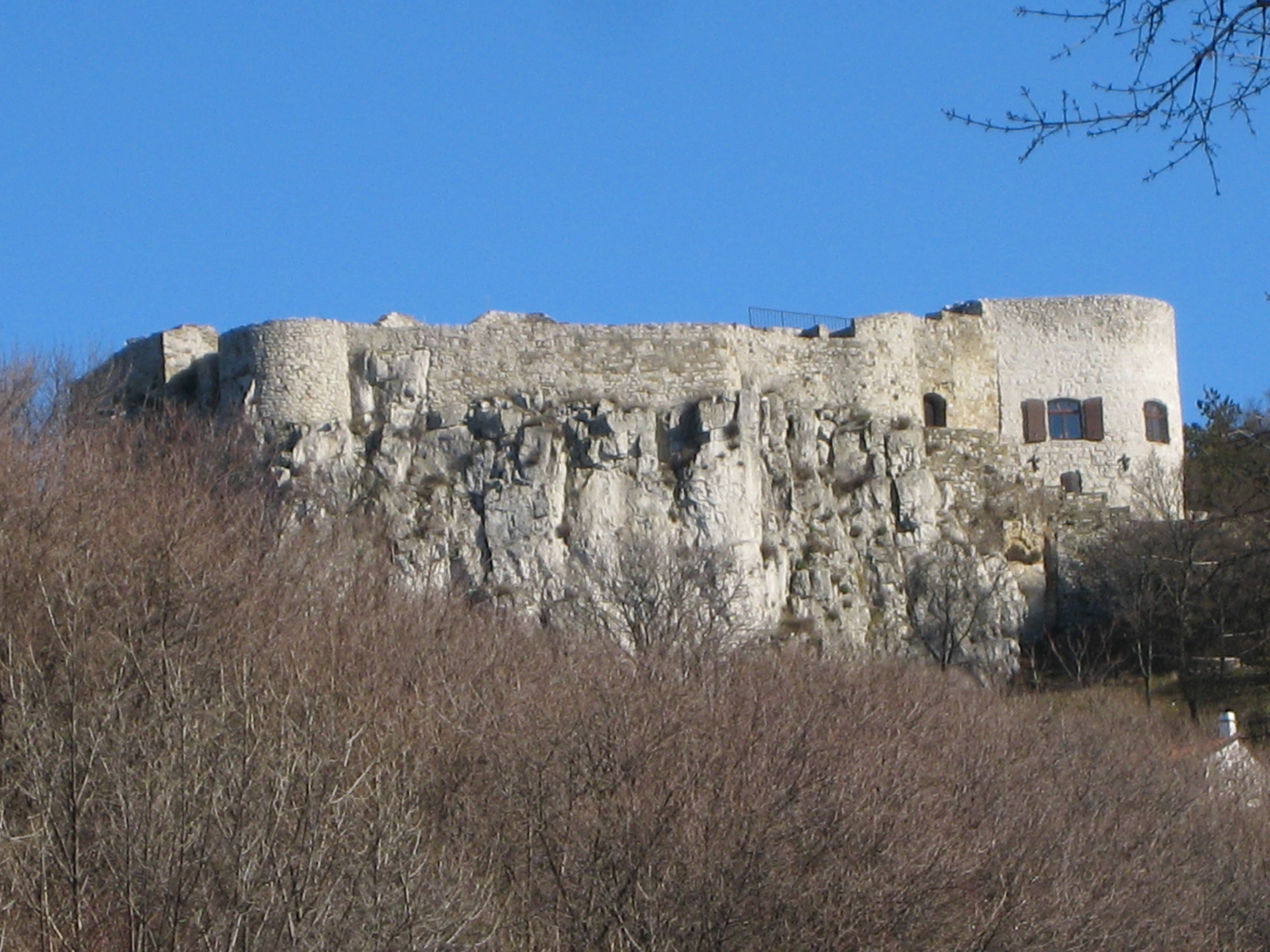 Il castello di San Servolo, nei dintorni di Trieste. Gennaio 2008